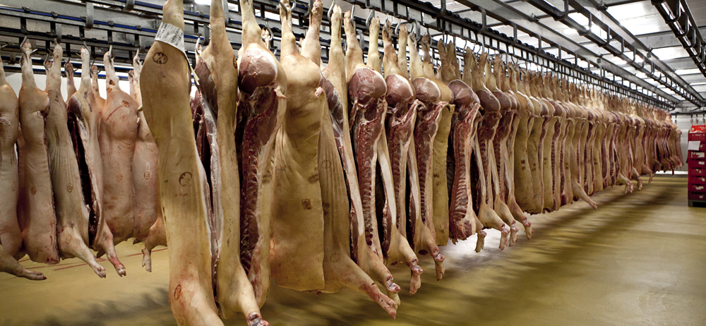 SPAR húsüzem, Bicske